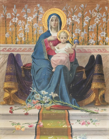 Madonna in trono col Bambino, 1916 olio su tela, cm 183 x 144, firmata, coll. privata